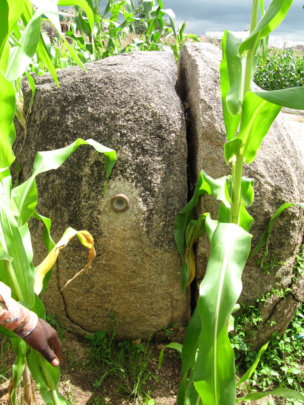 Borne frontière entre le Cameroun et le Nigeria 2012